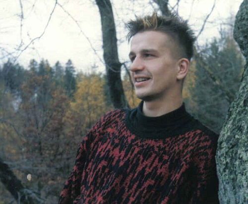 Thomas Gerards alias Melitta Sundström 1987 im Waldschlößchen - Proben zum Theaterstück "die Schönheit" von Ronald M. Schernikau.